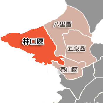 林口區相對位置。